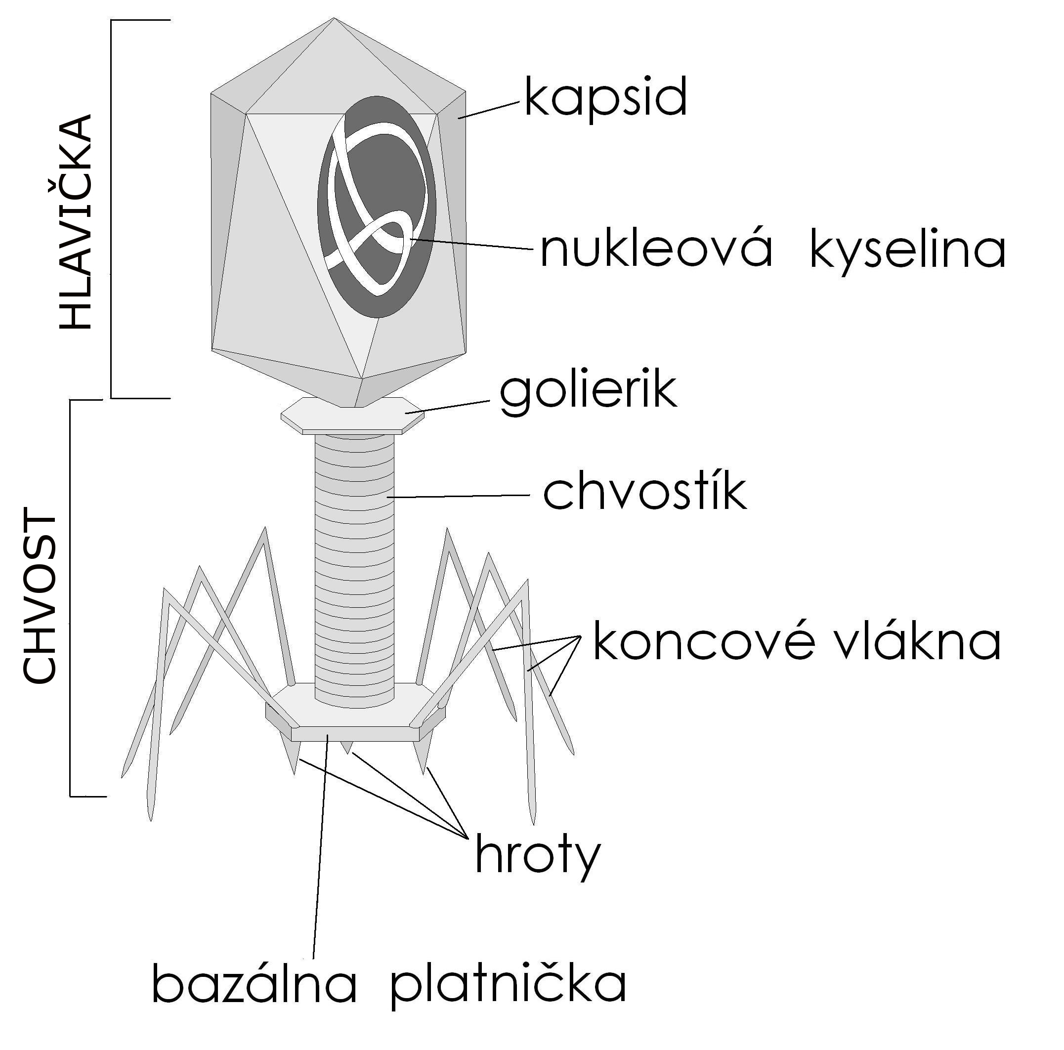 Stavba bakteriofágu